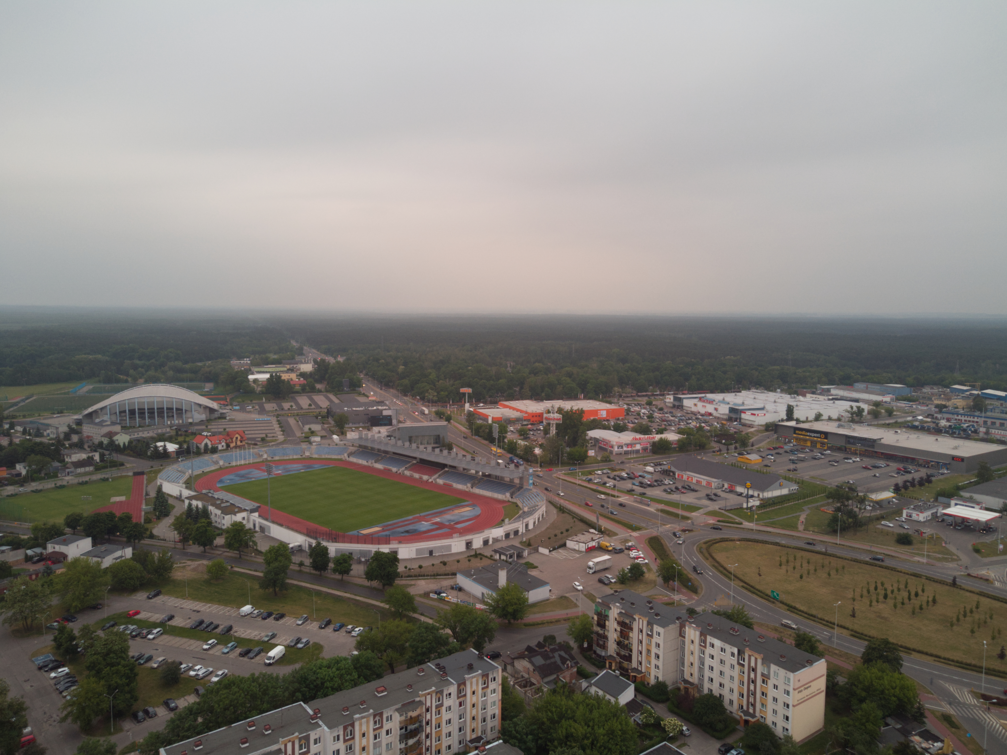 Styk Kazimierza Wielkiego i Śródmieścia (2020 r.)